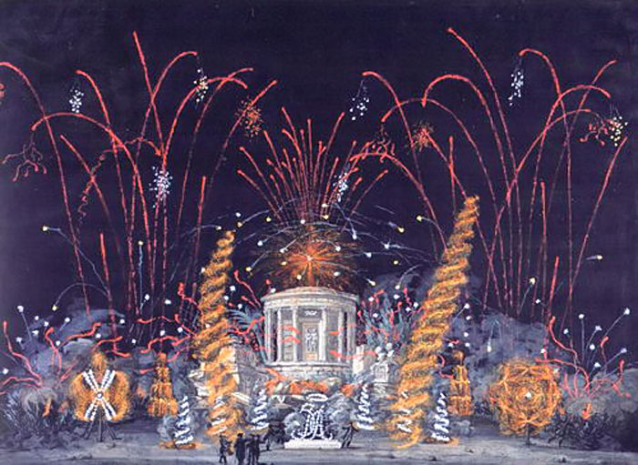 Беларуская (тарашкевіца): Фаервэрк у Воўчыне (Voŭčyn) у гонар зашлюбін Адама Чартарыйскага (Adam Čartaryjski) і Ізабэлы з Флемінгаў. 1761 рок